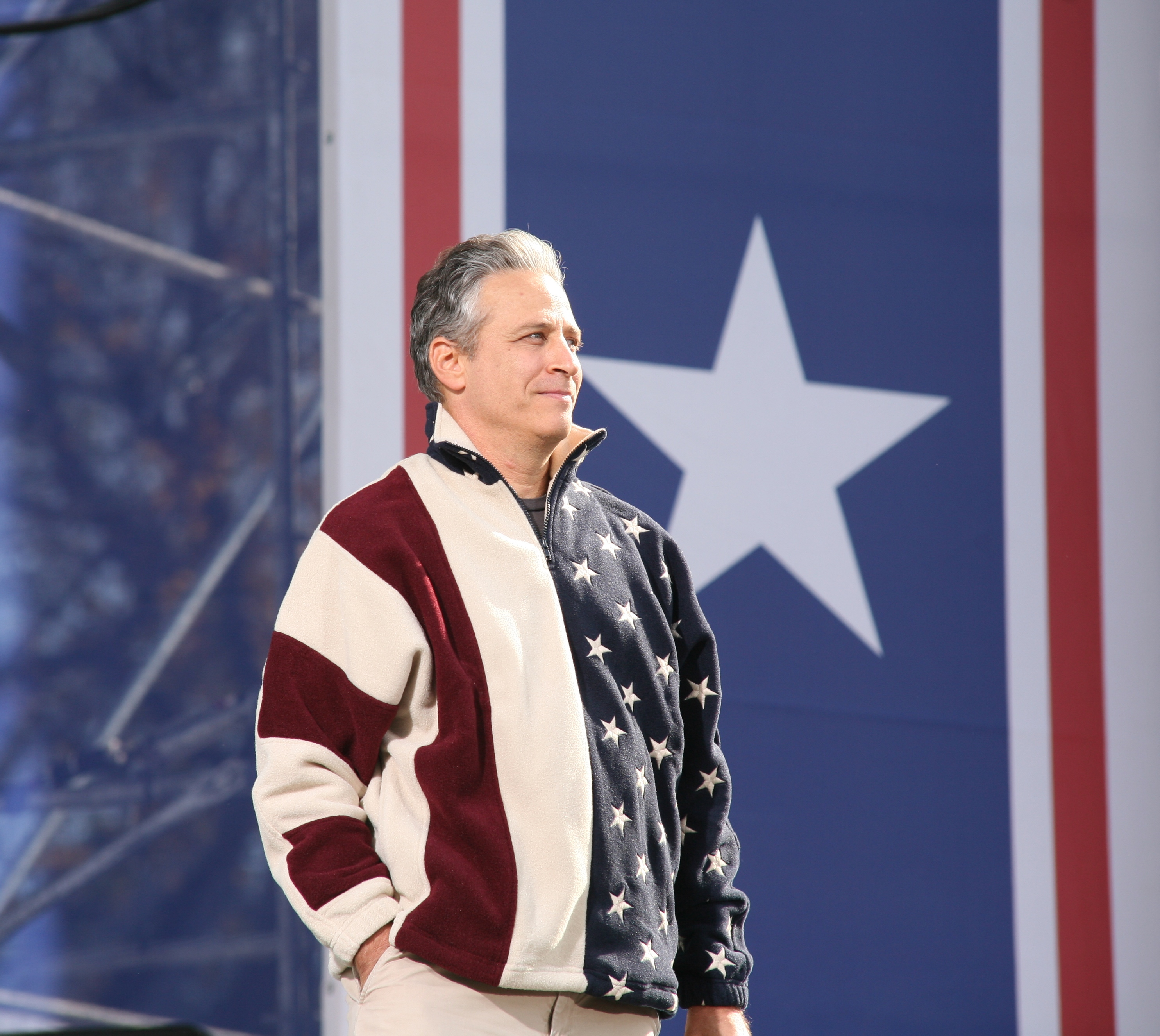 Jon Stewart